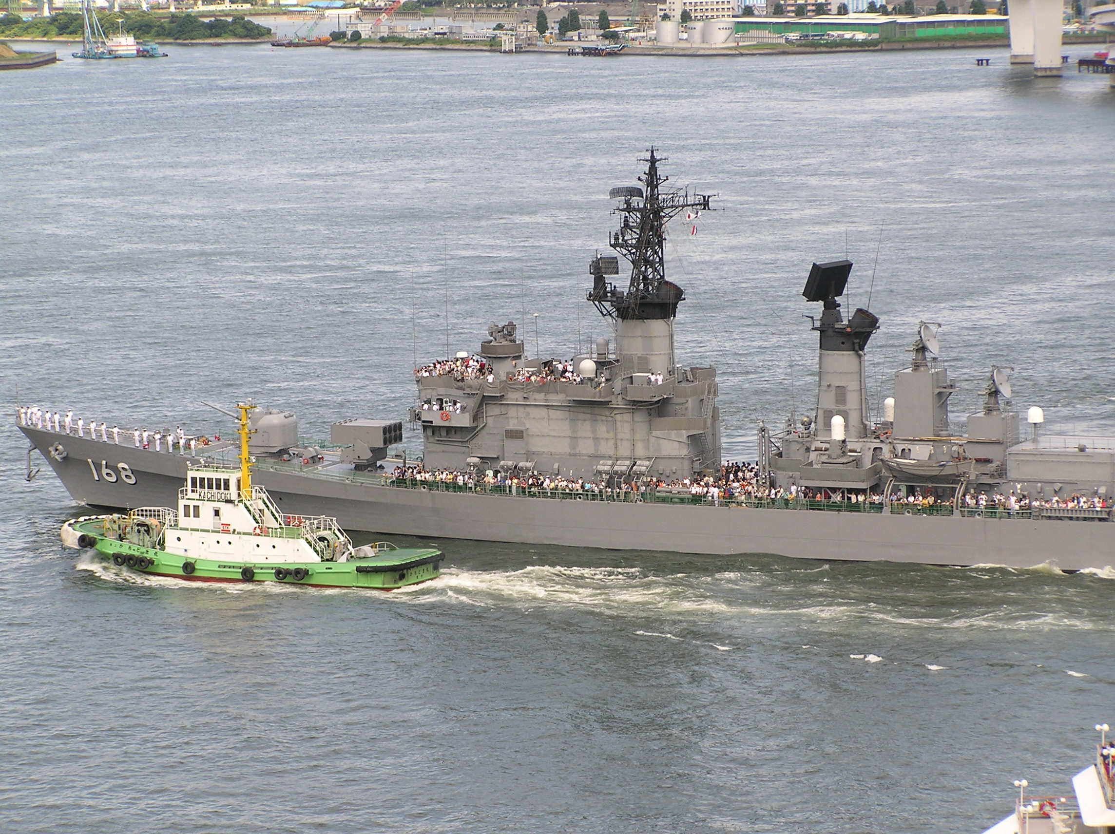 DDG-168 Tachikaze, JMSDF (たちかぜ型護衛艦たちかぜ、海上自衛隊)